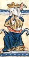 Violante von Aragón